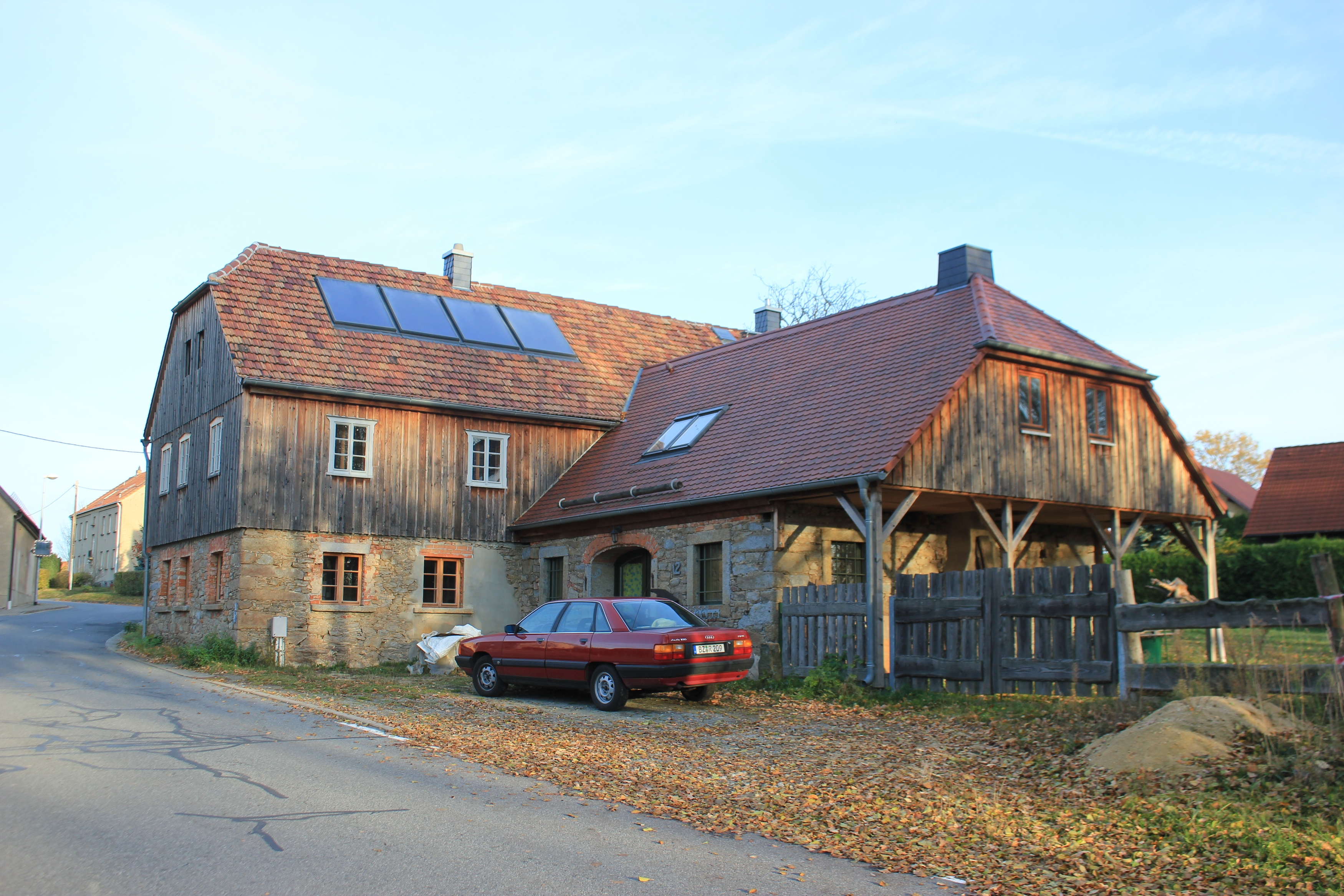 Hornjoserbsce: Bolborcy; domske čo. 12 (kulturny pomnik).